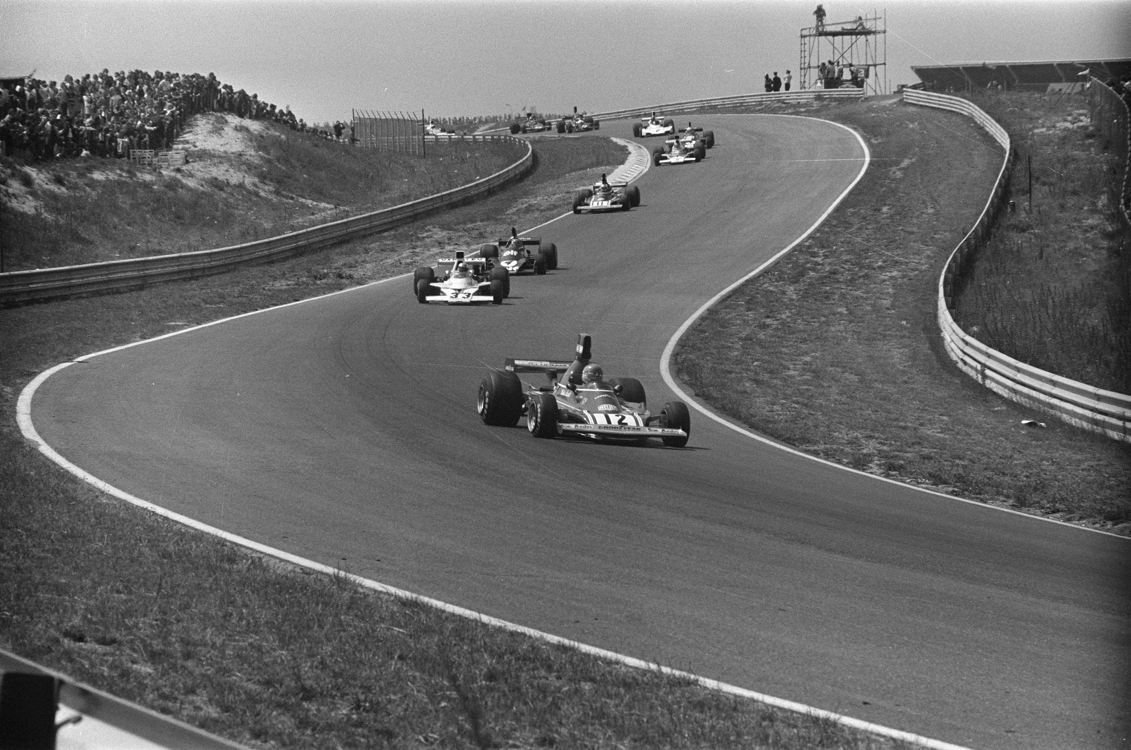 Grand Prix op Zandvoort, Niki Lauda (Ferrari-12) achter hem Mike Hailwood (33).